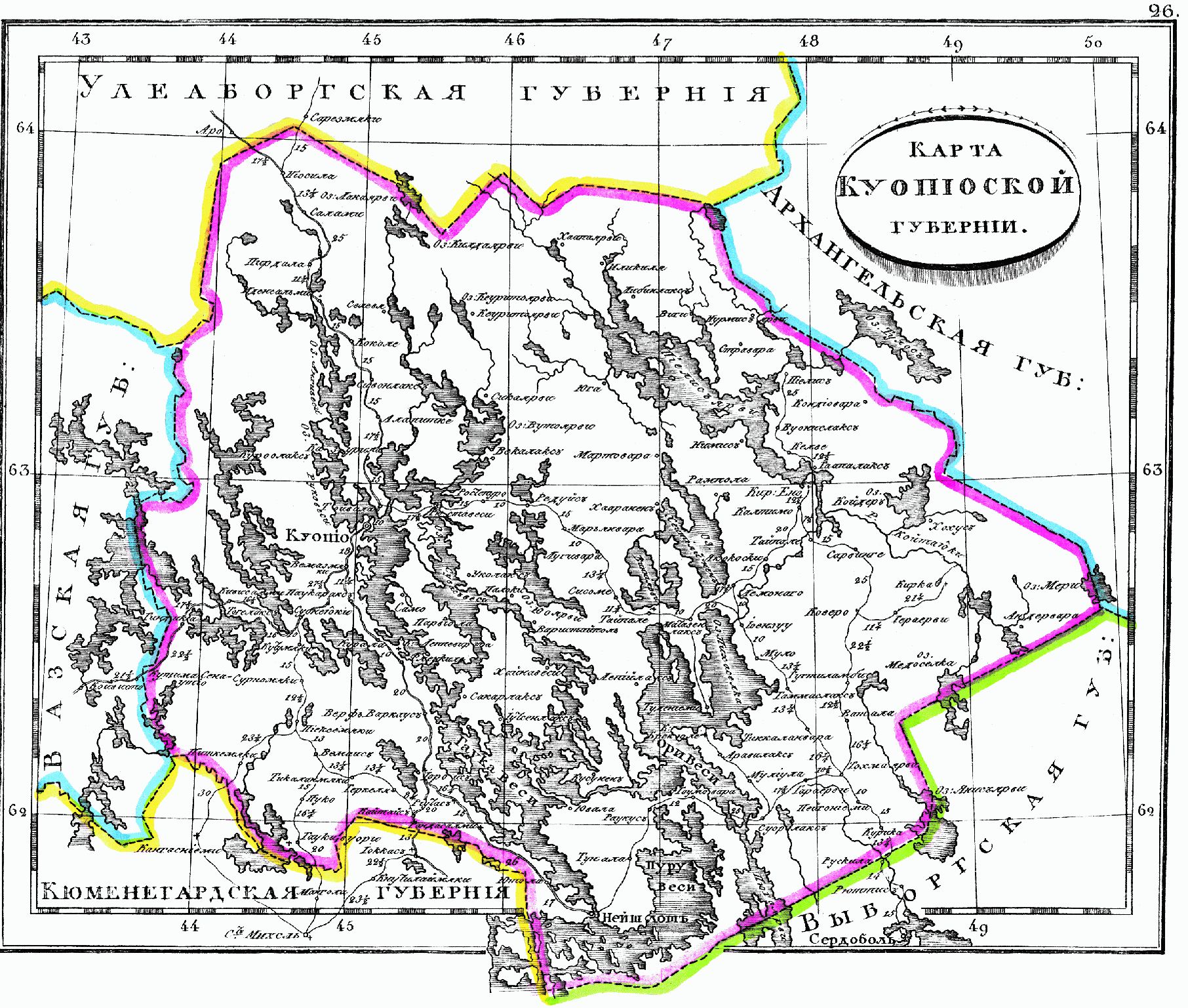 Карта Куопиоской губернии Великого княжества Финляндского, 1835